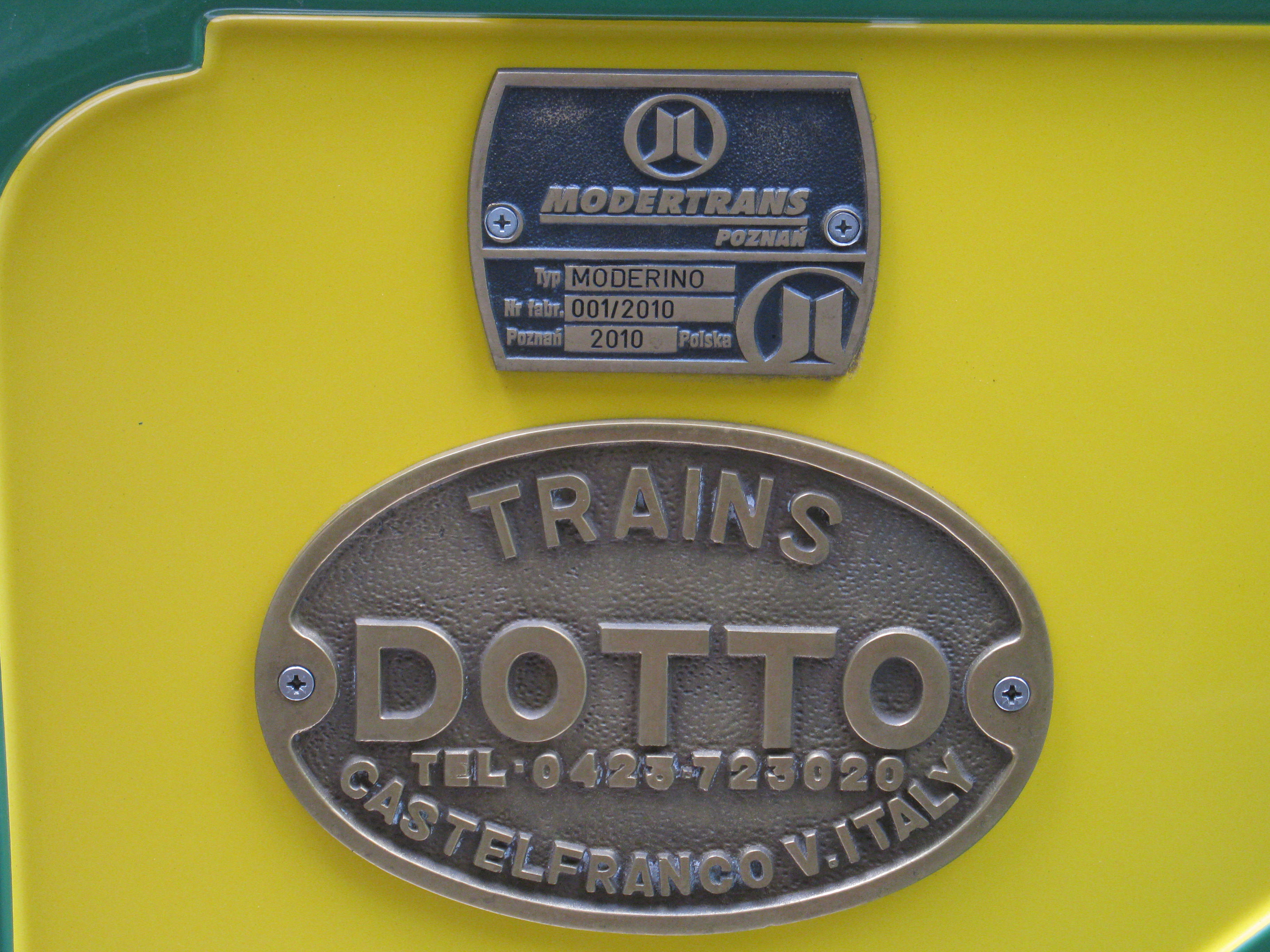 Kolejka parkowa "Zwierzynka" w Nowym Zoo w Poznaniu